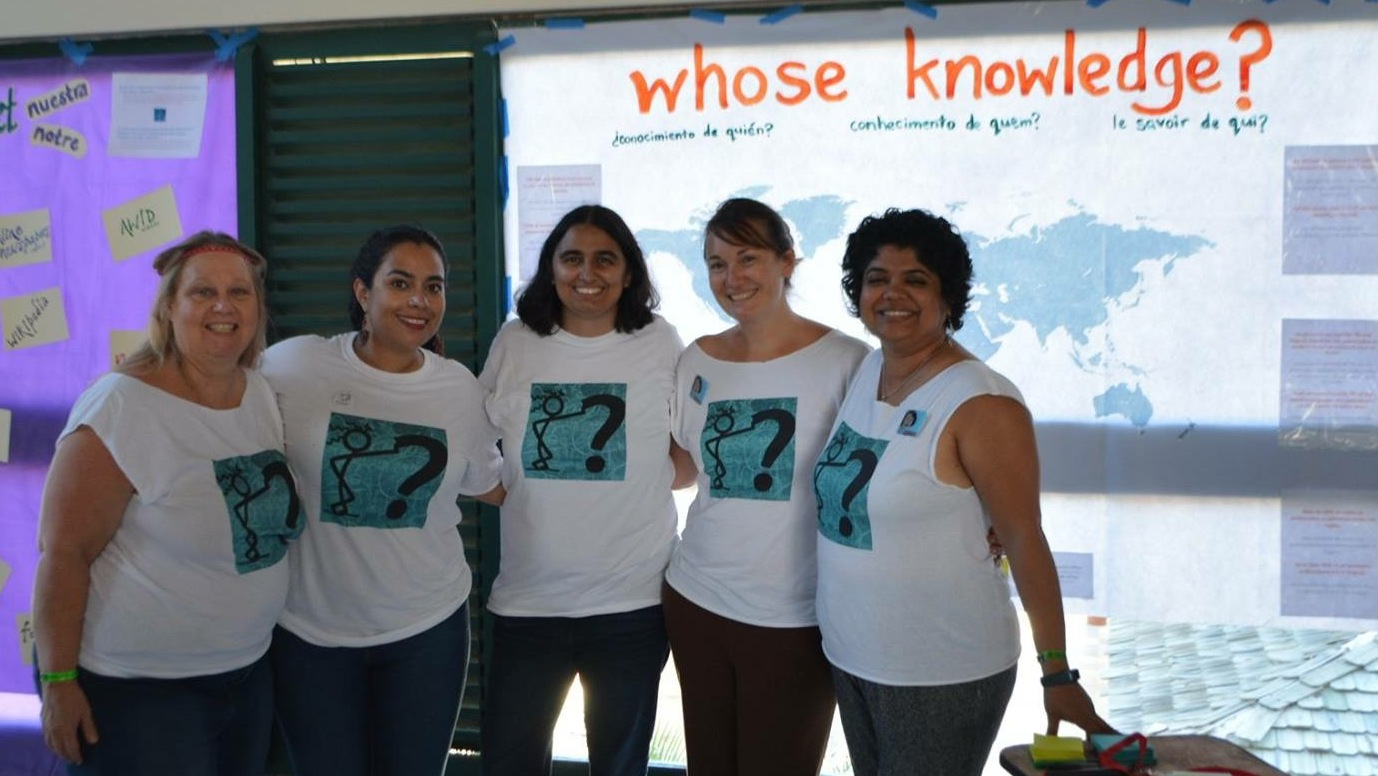 Wikimujeres delegation at AWID Forum